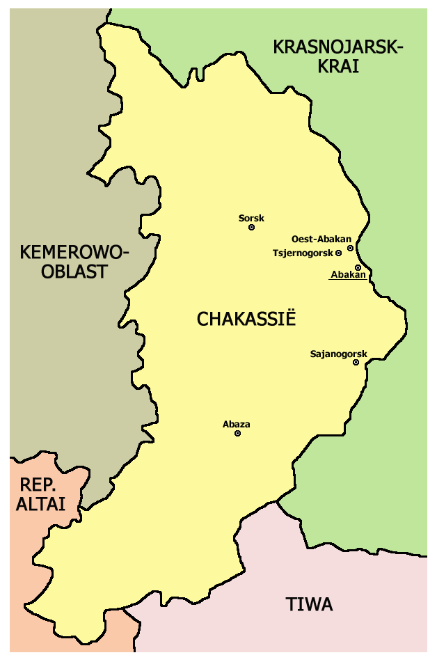 Kaart van Chakassië in Rusland